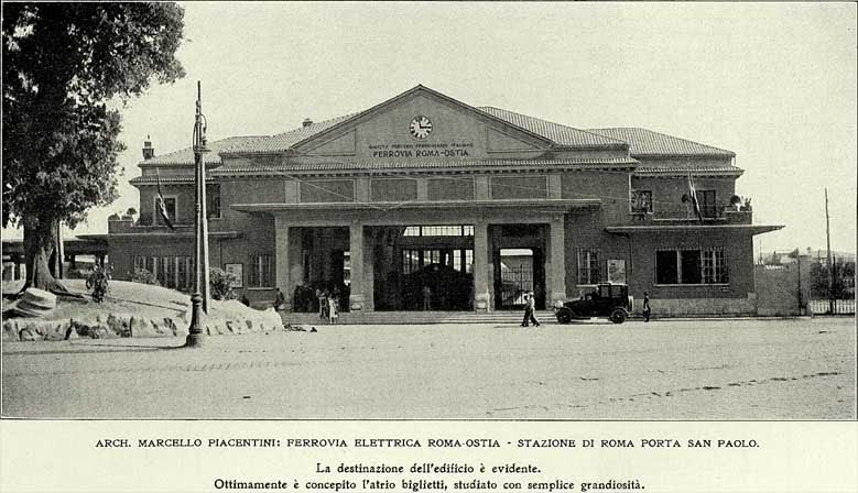 Stazione Roma-Lido di Porta s. Paolo